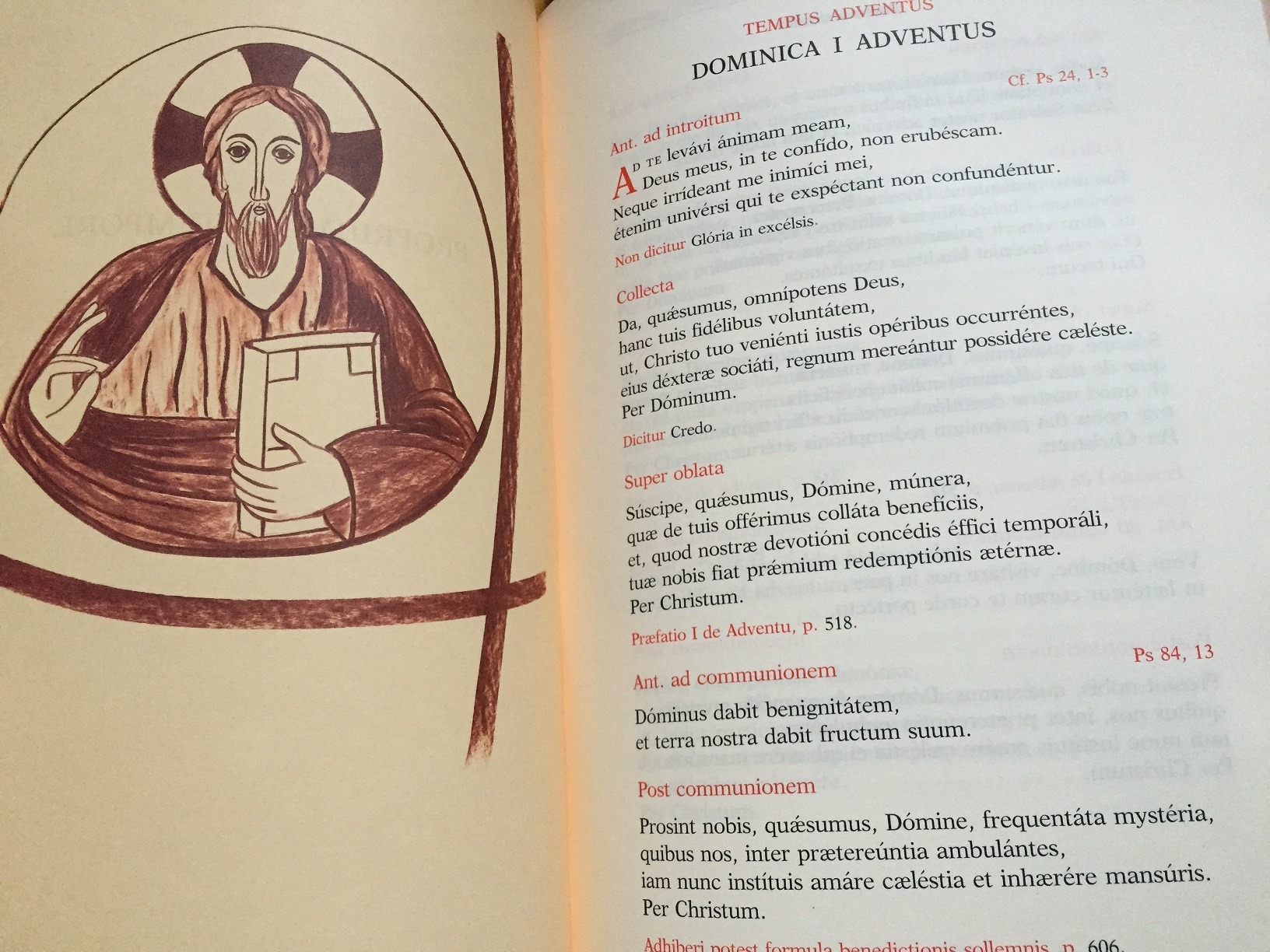 로마 미사 경본 제3표준판